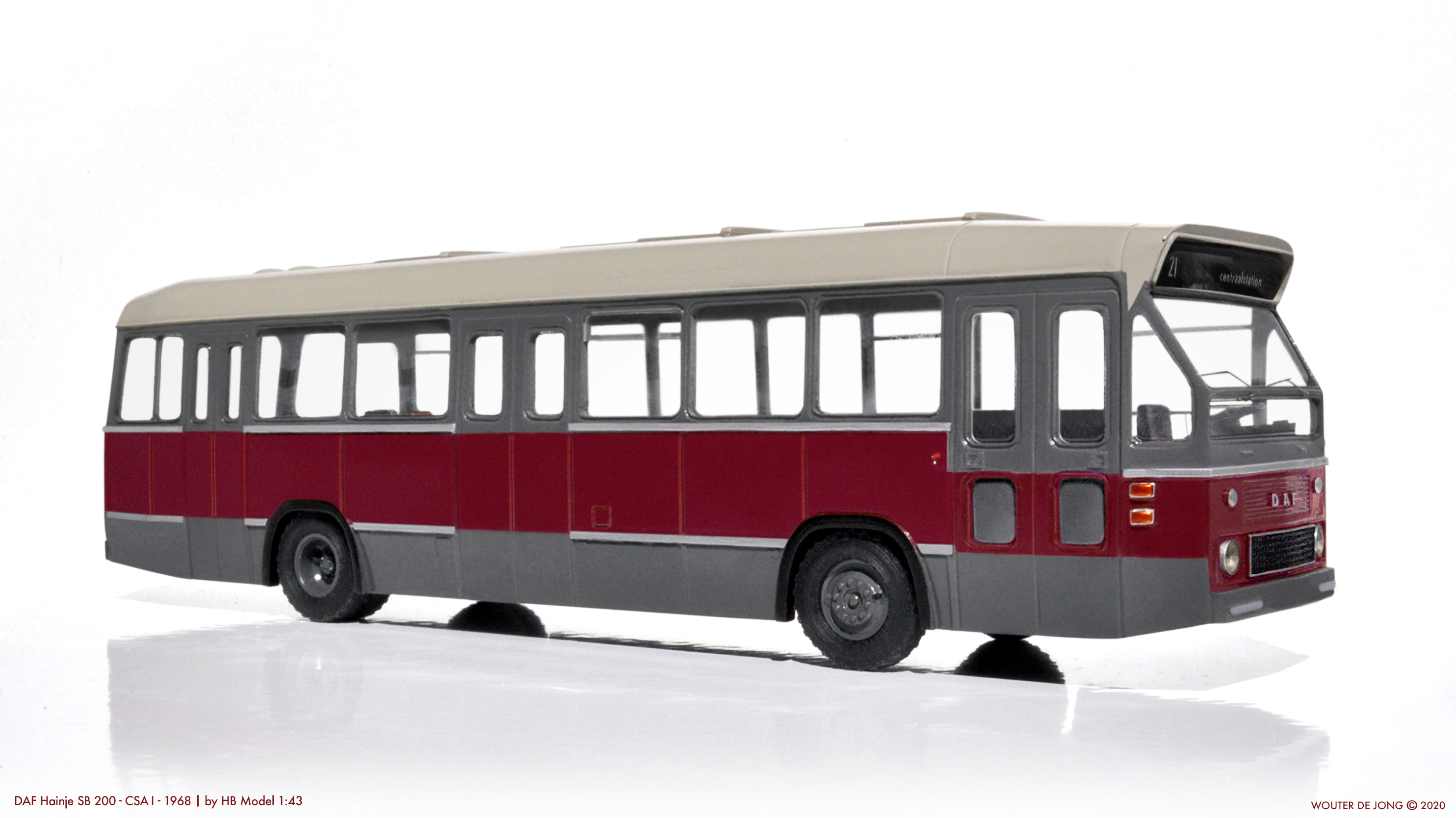 Schaalmodel 1:43 van HB-Model, Eerste model standaard bus CSA-I